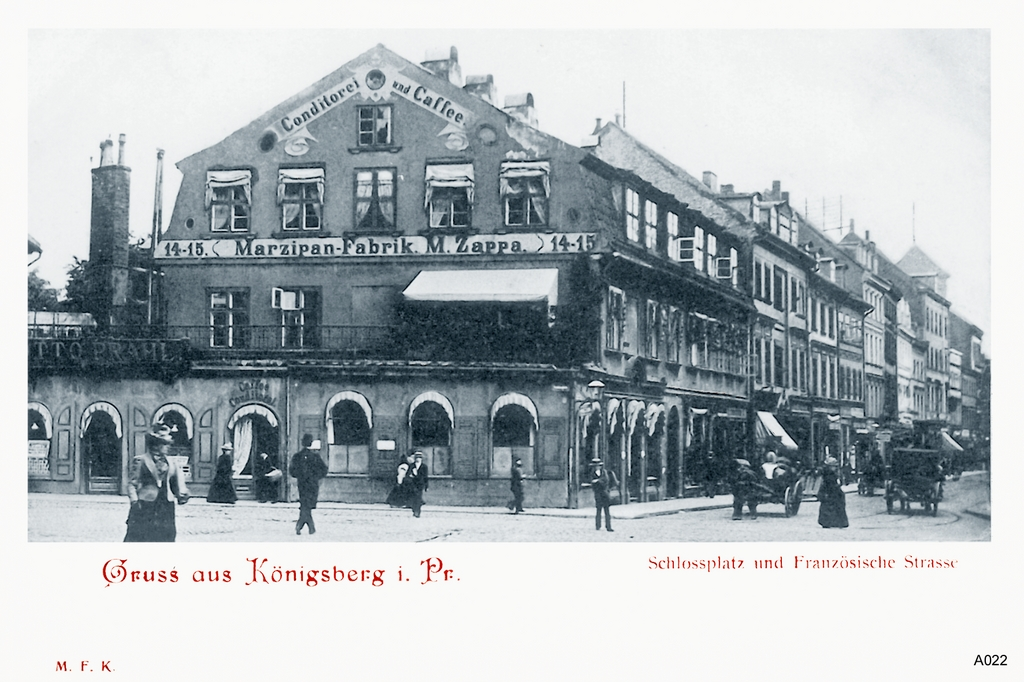 Königsberg